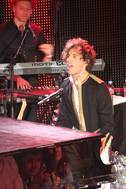 Mika was in België en Q was er bij!